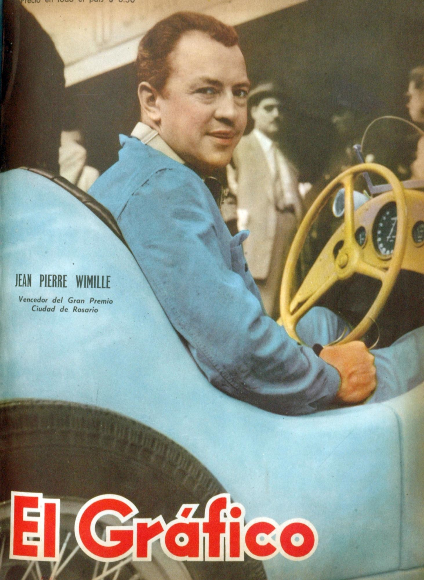 El Grafico del 13 de Febrero de 1948. Edicion 1492